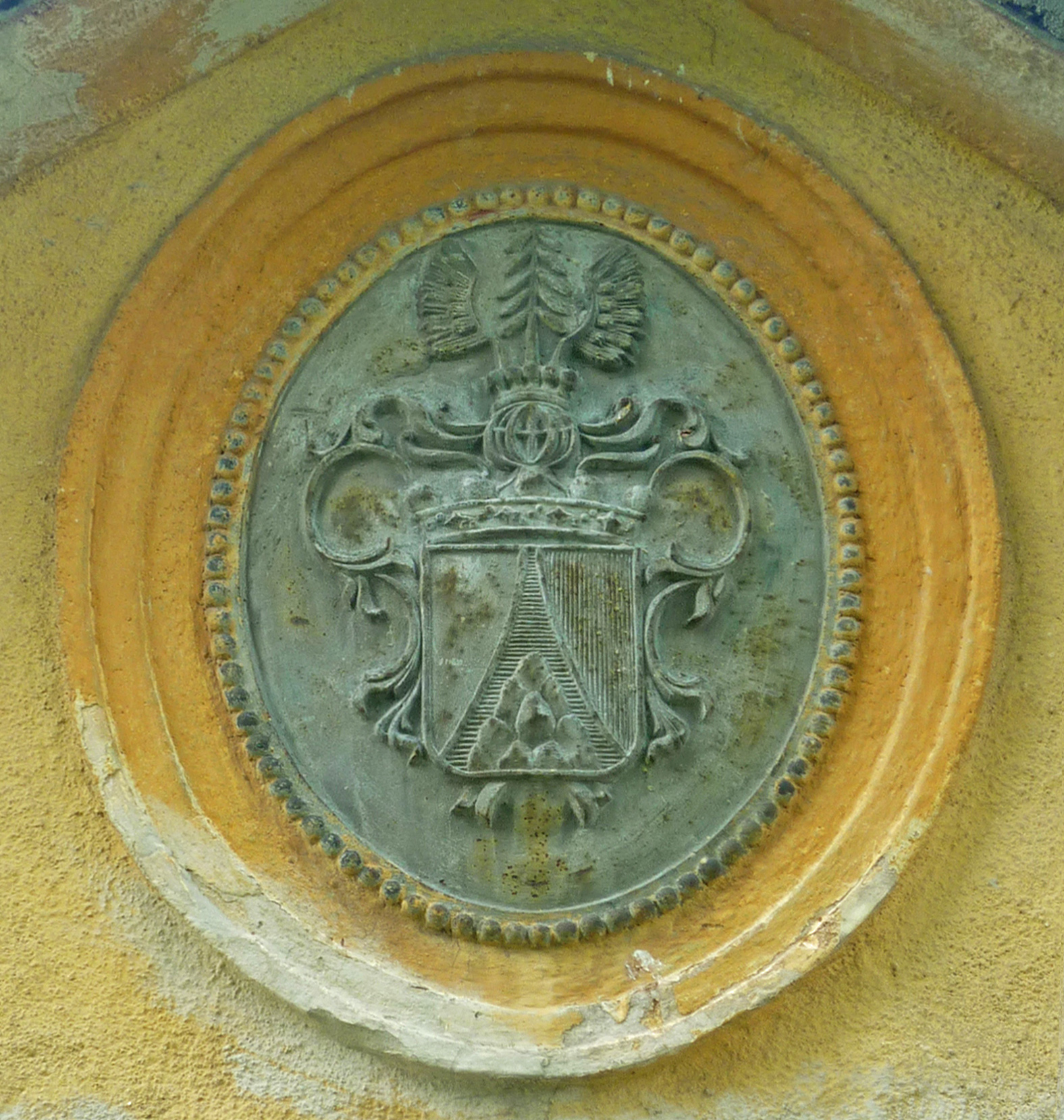 Wappen der Familie von Zessner-Spitzenberg am ehemaligen Badehaus in Dobritschan (Dobříčany)